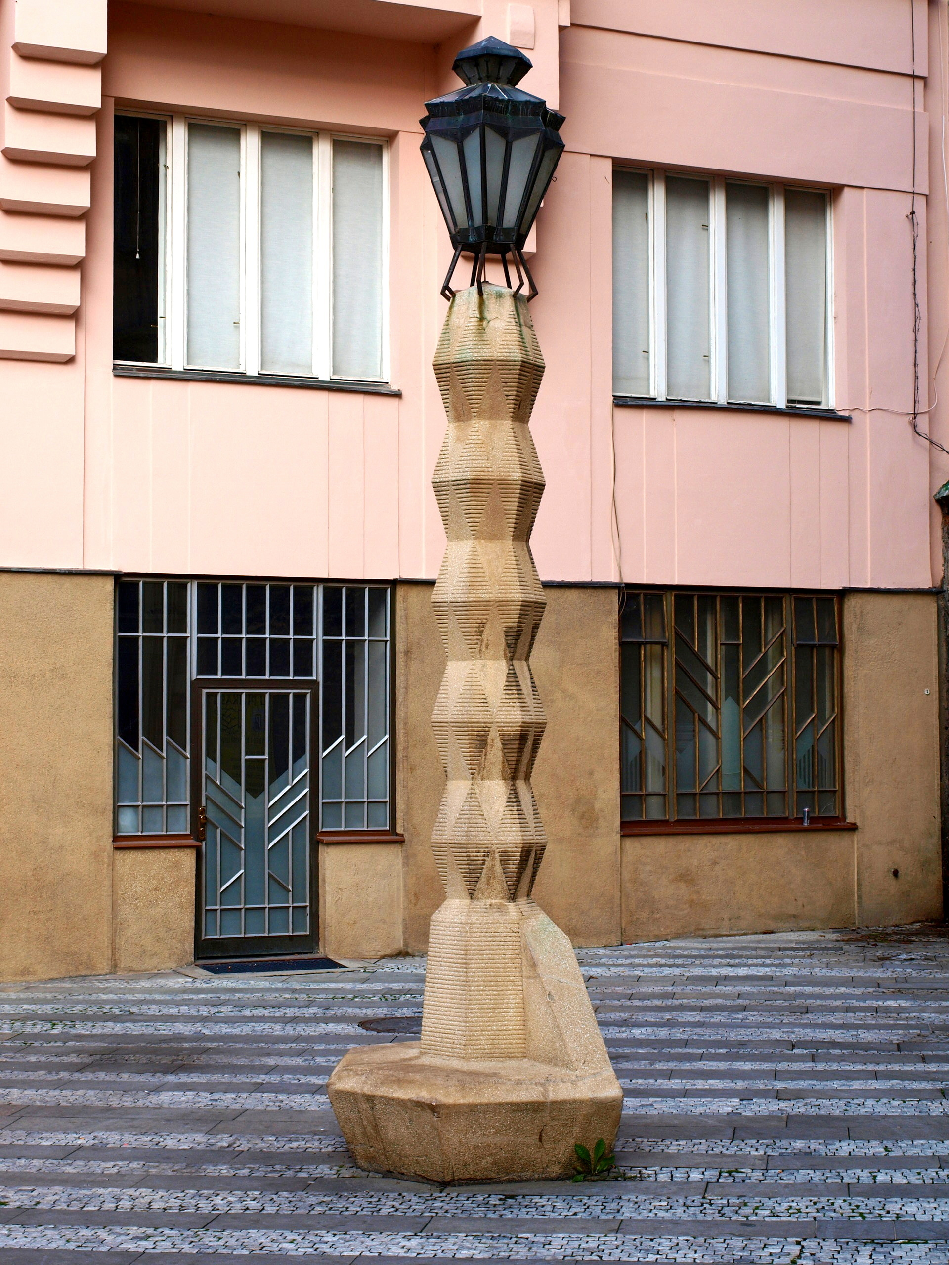 Praha-Nové Město, kubistická pouliční lampa Emila Králíčka